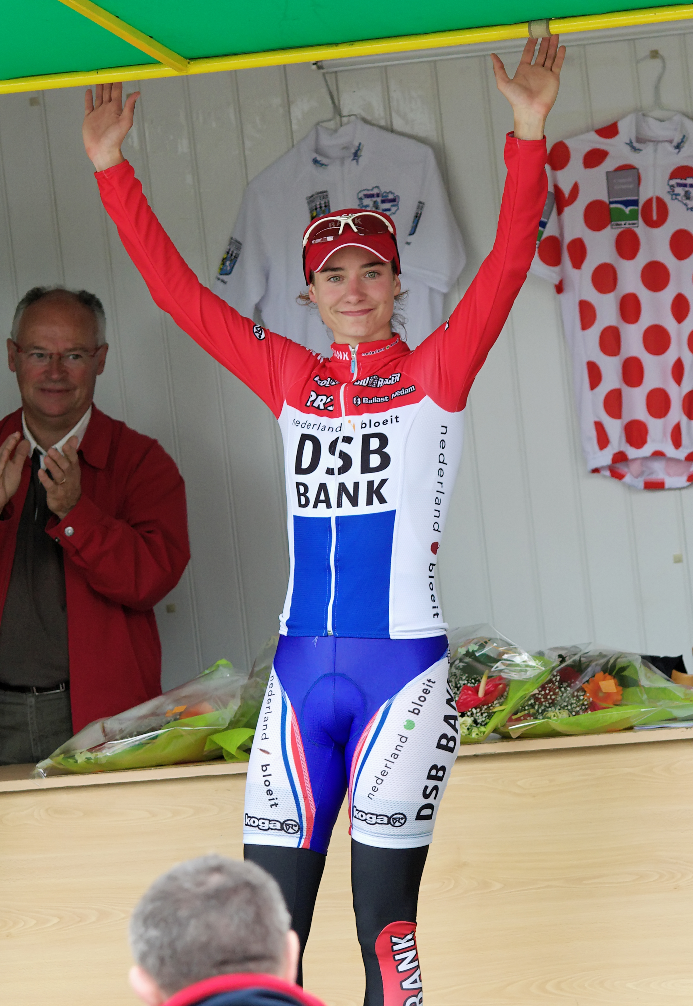 Marianne Vos